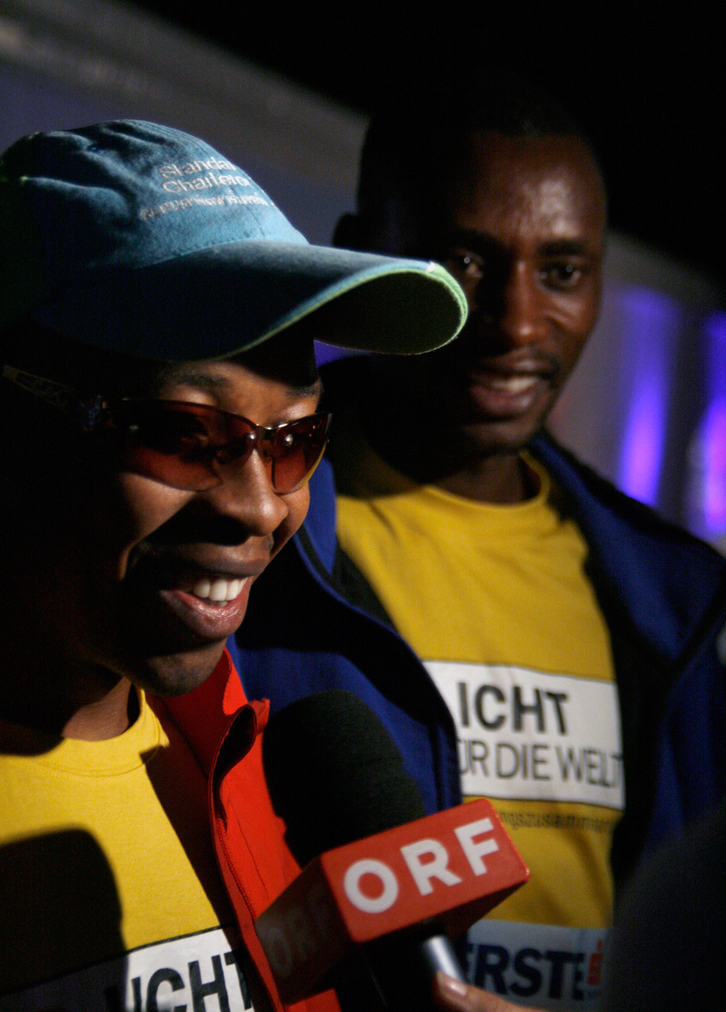 Henry Wanyoike und Joseph Kibuna (Vienna Night Run 2009, Wien)